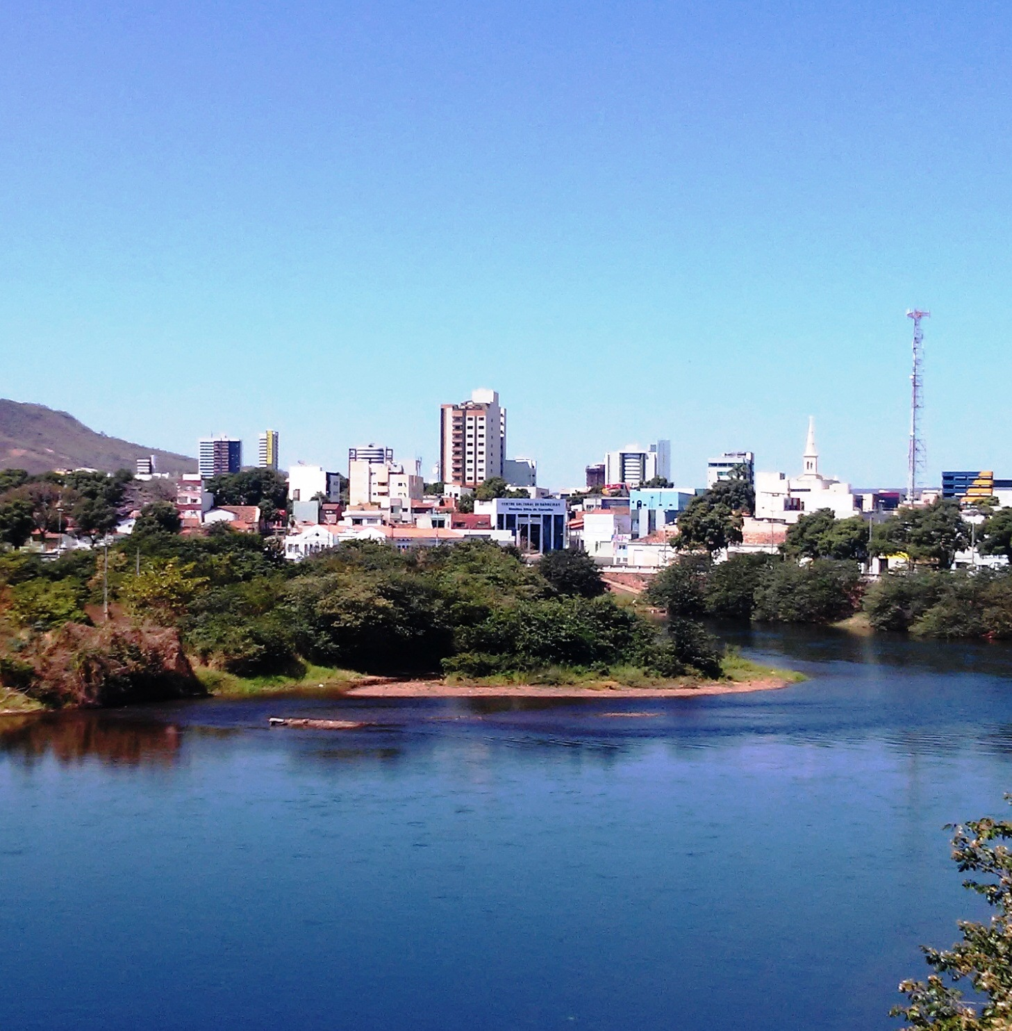 Cais de Barreiras